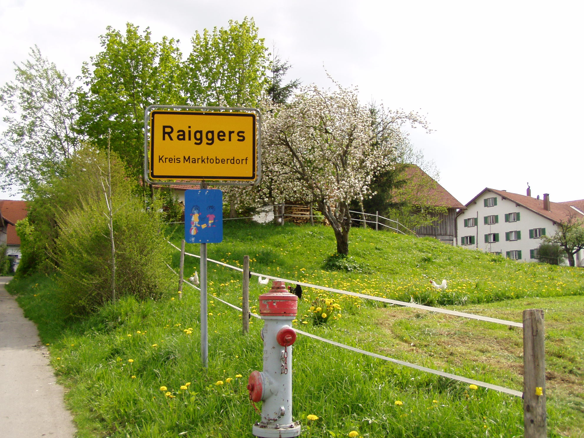 Raiggers, Kraftisried - altes Ortsschild